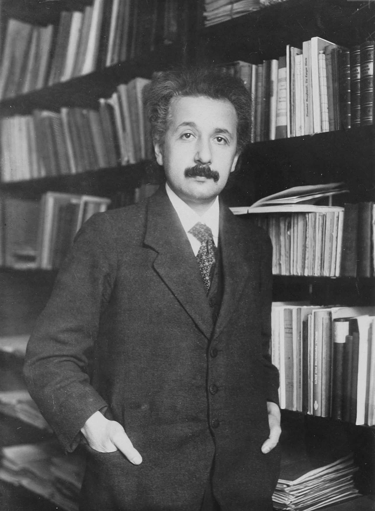 Albert Einstein, in der Hausbibliothek von Paul Ehrenfest (Leiden, Witte Rozenstraat), wo Einstein 1916 wohnte.